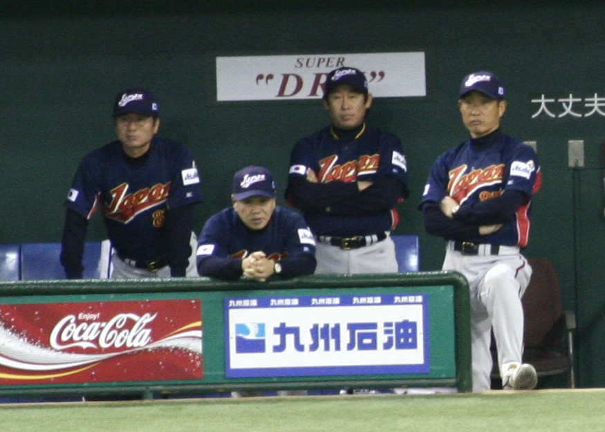 2006 ワールド・ベースボール・クラシック日本代表コーチ陣（左から大島康徳、弘田澄男、鹿取義隆、辻発彦）